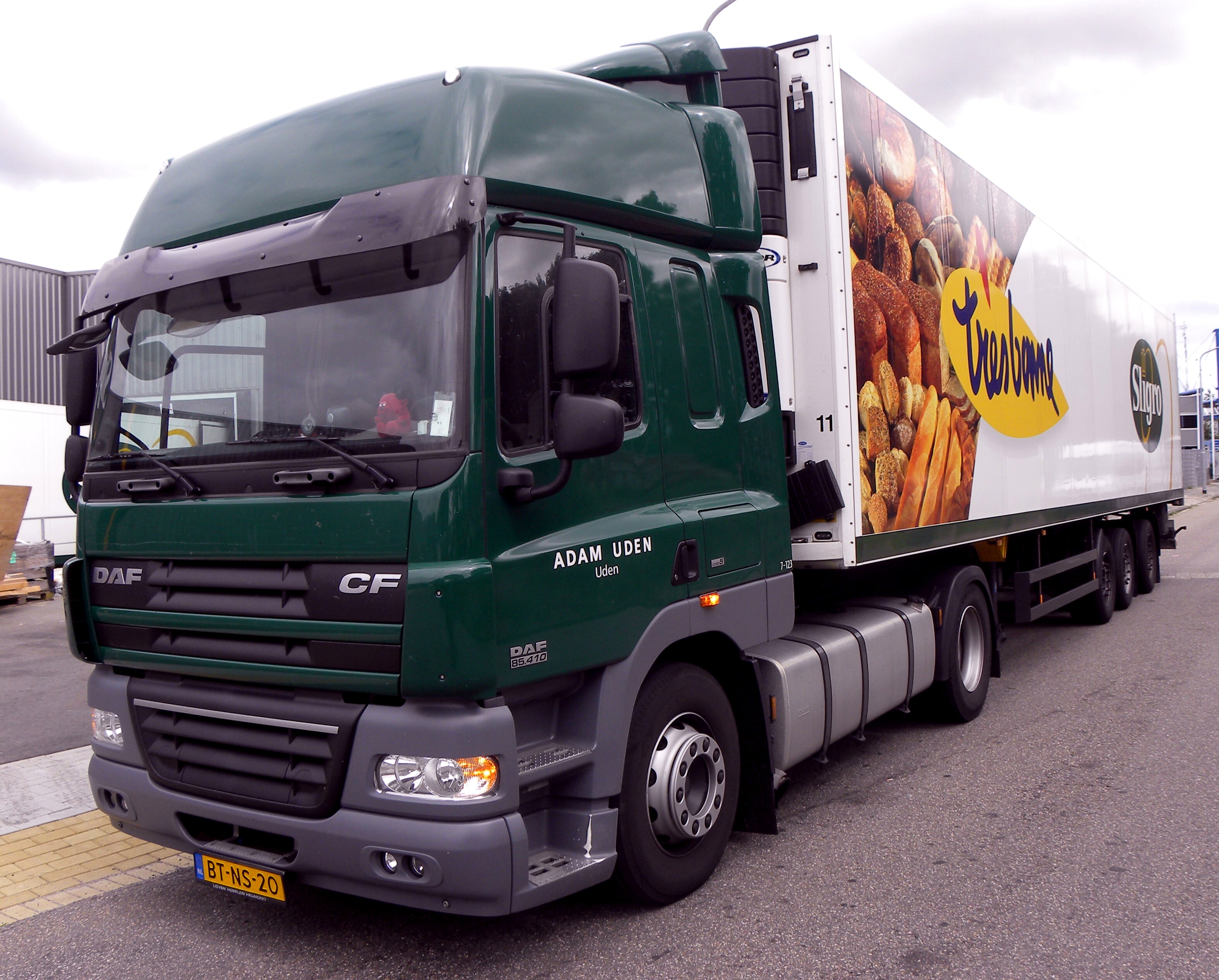 Daf CF 85.410 Sligro